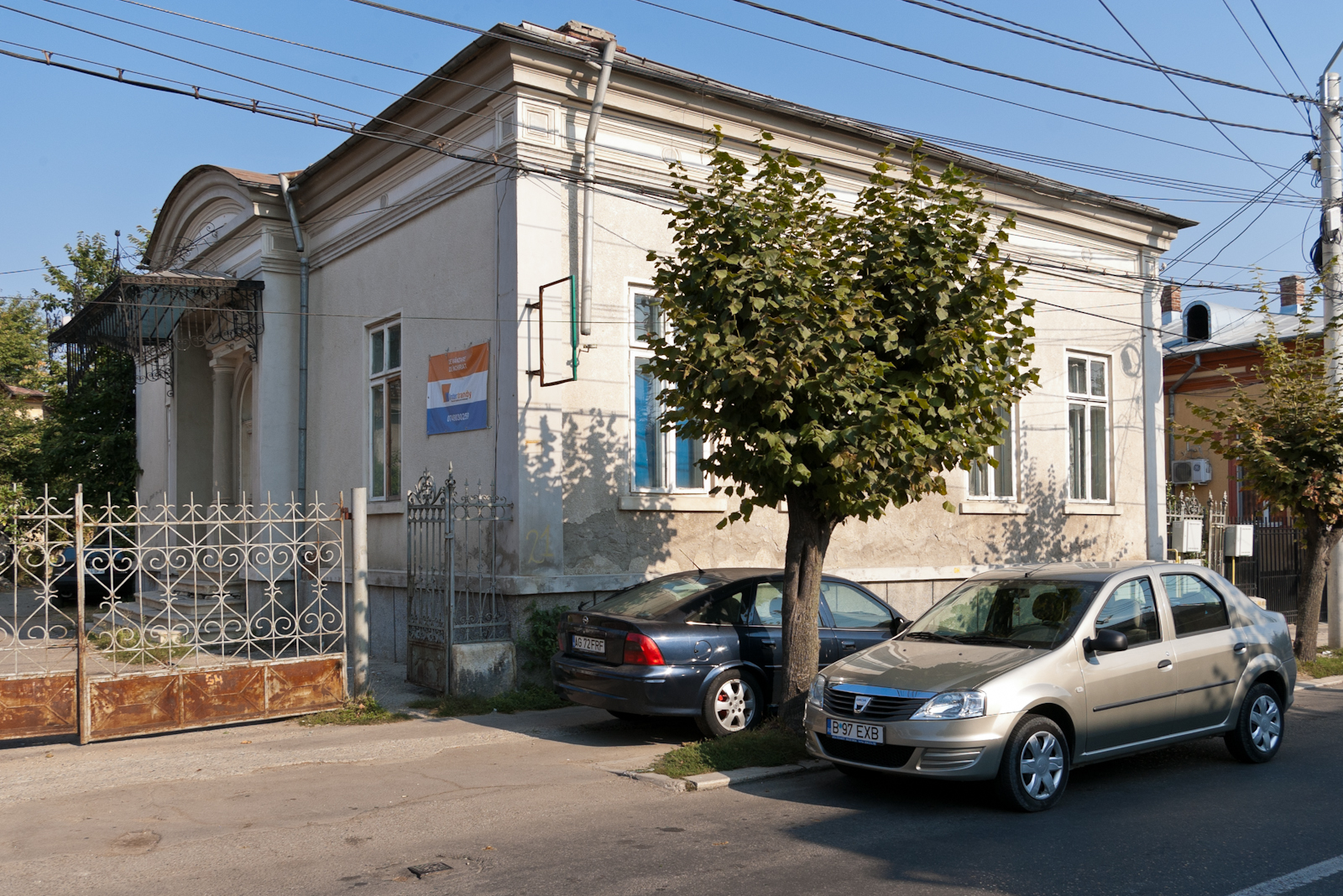 Fotografia prezinta casa de pe str. Crinului 21, vazuta dinspre SE.